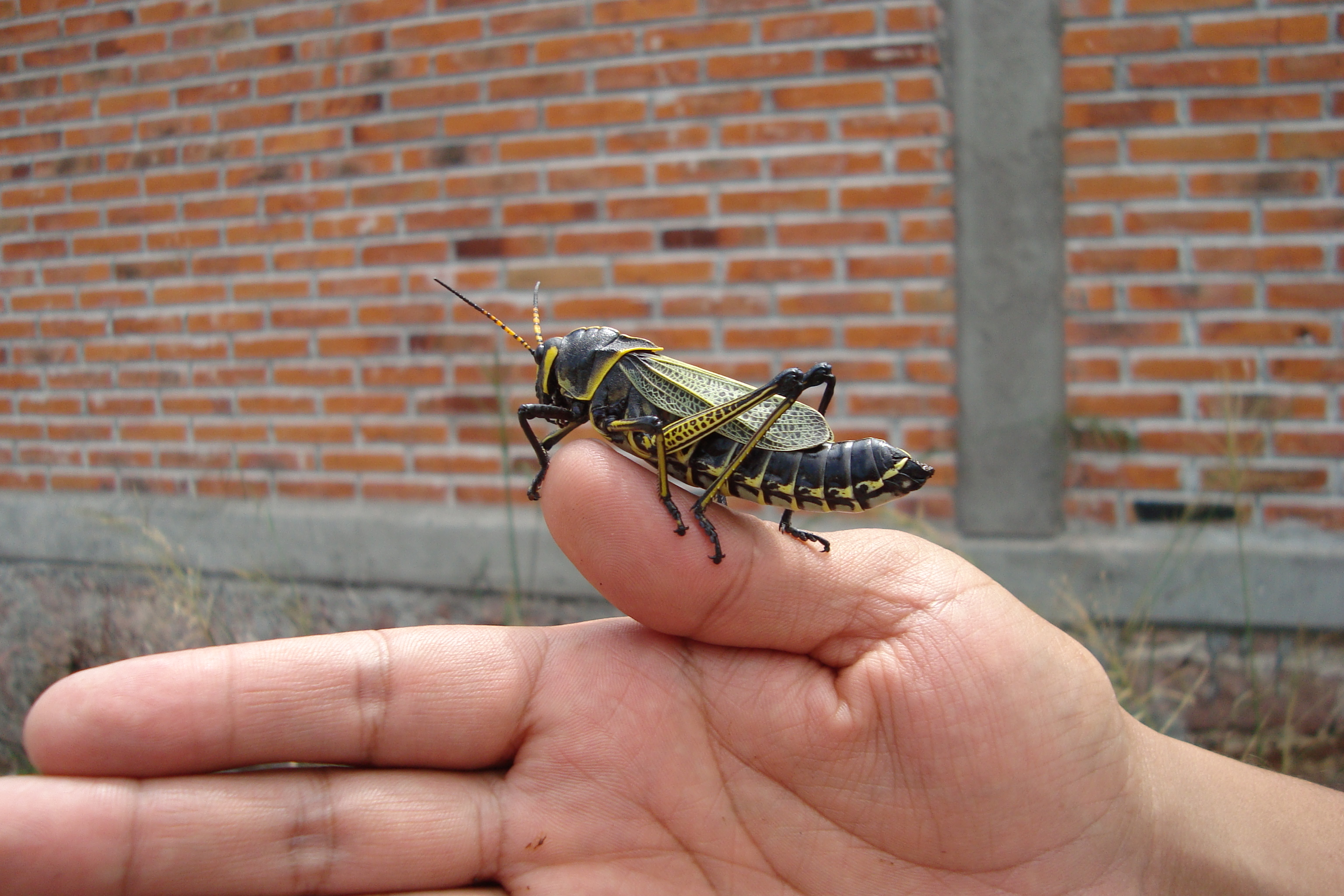 Orthoptero de gran tamaño del estado de Hidalgo, México